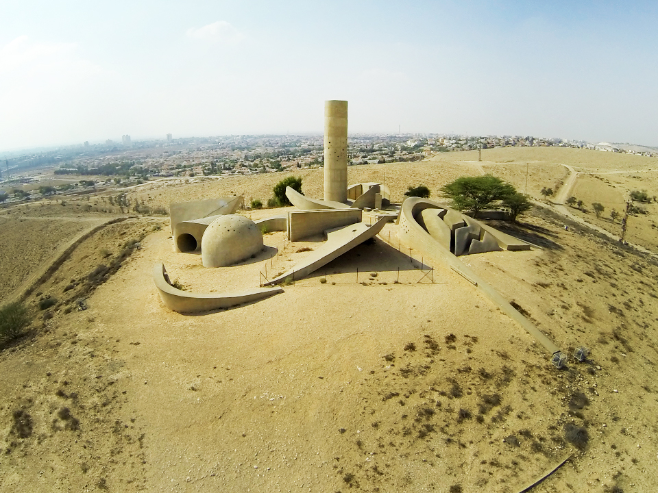 אנדרטת חטיבת הנגב היא אנדרטת זיכרון המוקדשת לחללי חטיבת הנגב של הפלמ"ח במלחמת העצמאות, הממוקמת בראש גבעת גיר במזרחה של באר שבע.